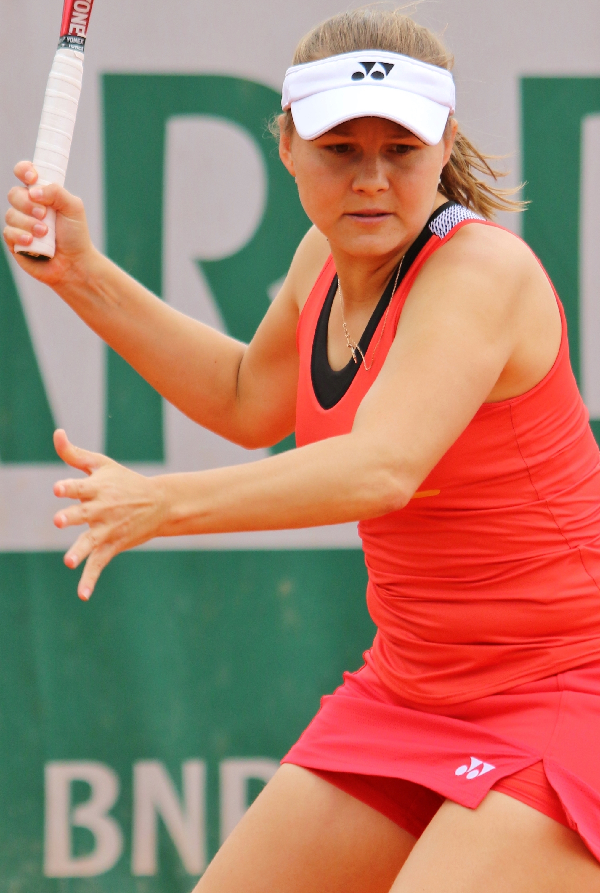 Rodina RG19 (43)